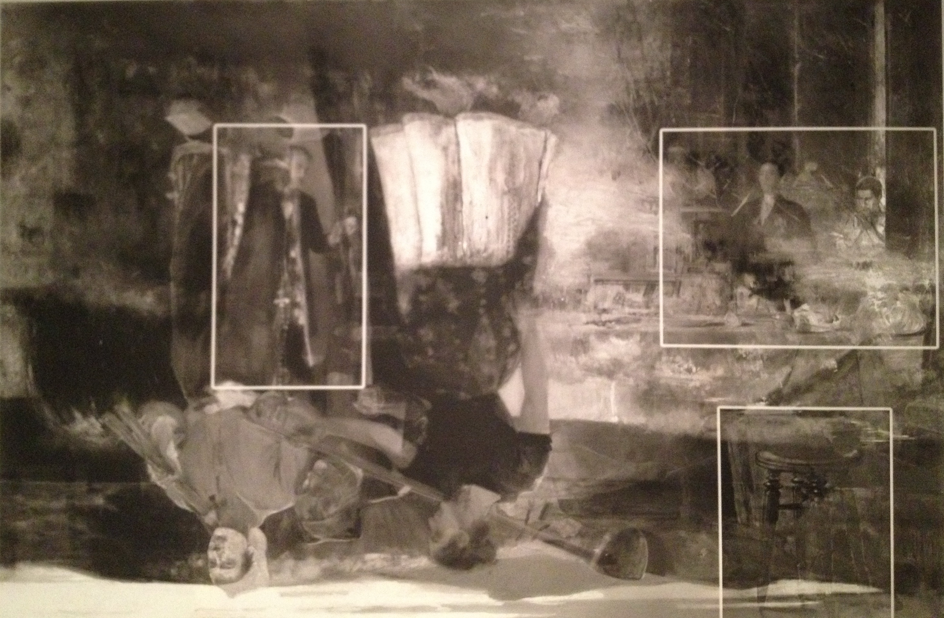 Reflectografia de "Tornant del Troç". Obra de Joan Llimona (1896)